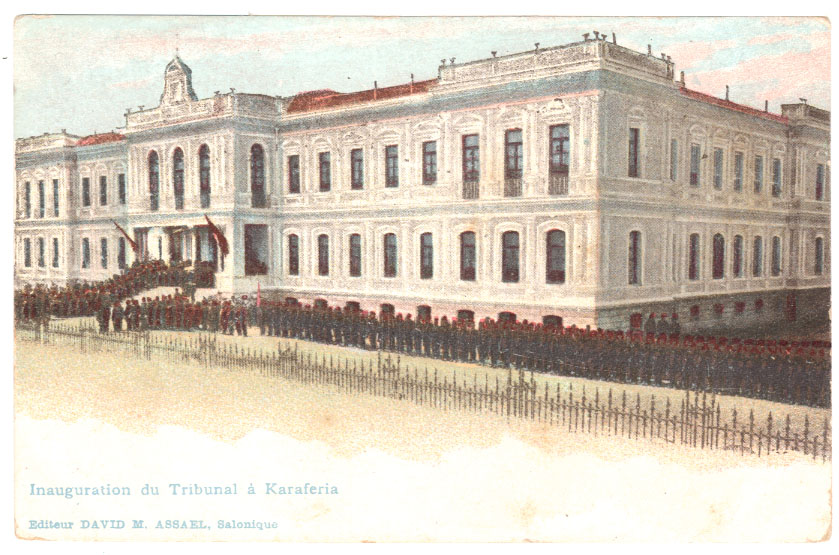 Откриване на съда в Сяр